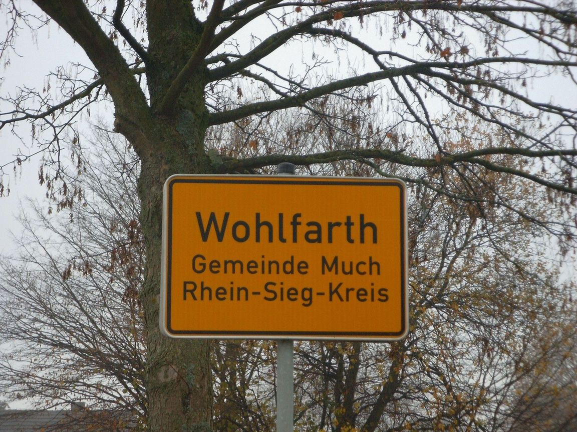 In den meisten Veröffentlichungen wird dieser Mucher Weiler falsch geschrieben, nämlich "Wohlfahrt". Er heißt aber richtig "Wohlfarth".